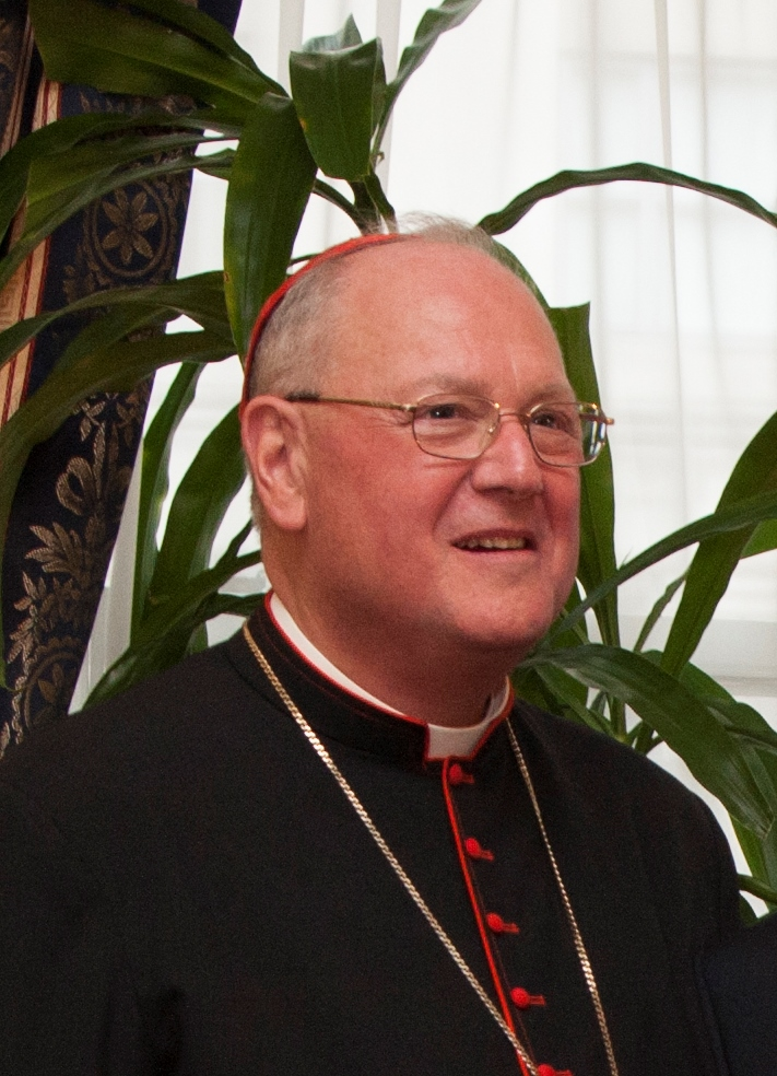 Cardinal Timothy M. Dolan Rabbi Arthur Schneier Papal Knighthood